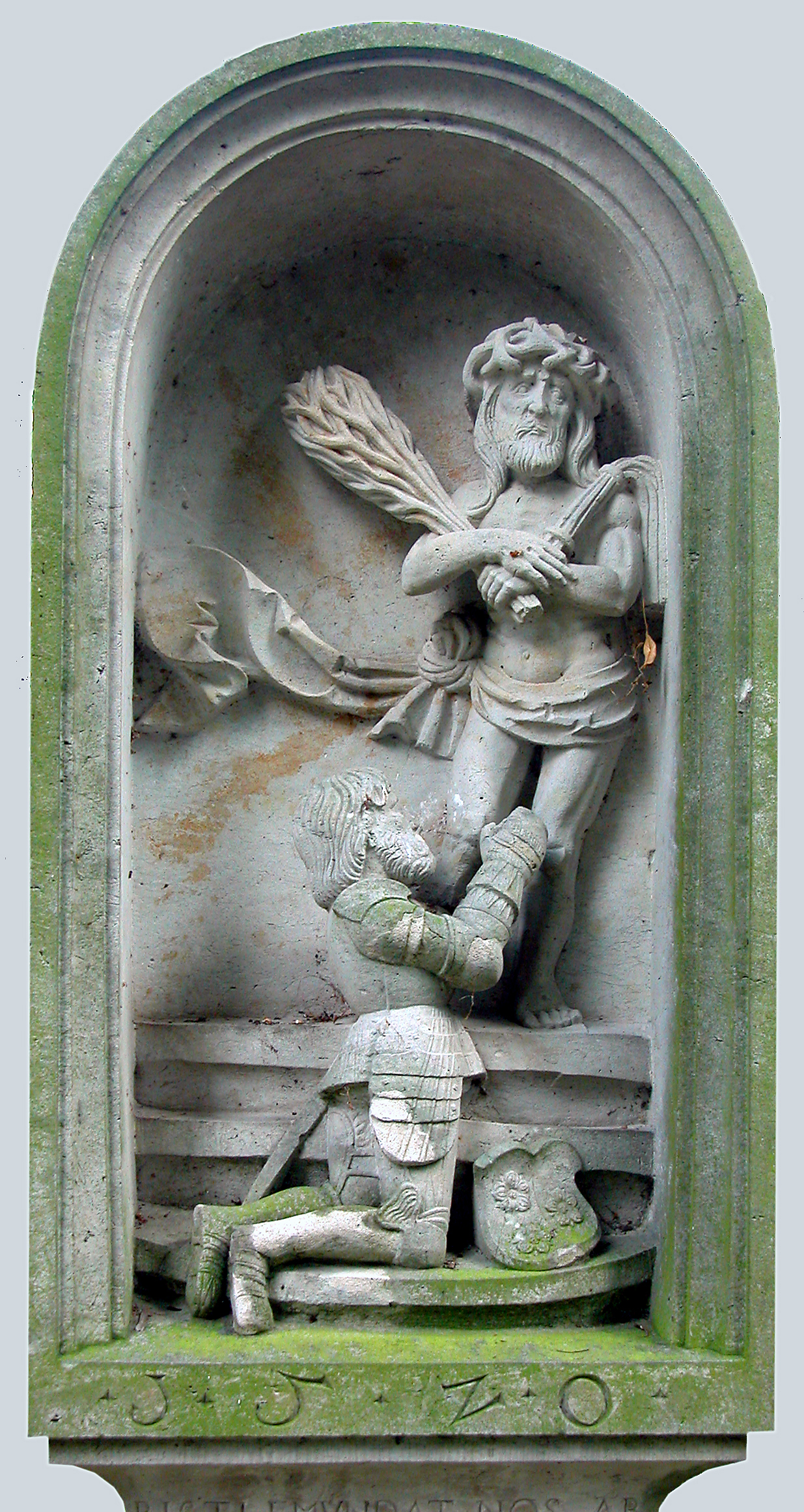 26.08.2007 01594 Ragewitz (Stauchitz): Schloßpark mit sog. Mönchssäule. Die Inschrift auf der Rückseite bittet die Gartenbesucher für das Seelenheil des Gartengründers, um 1520 Ritter Georg von Schleinitz, zu beten: WER DISES GARTENS LVST ADER FRVCHT WIRT GNISSEN, DER WOLT AVCH CHRISTLICHER LIBE SICH BEFLEISEN, VOR DIE SELE GOT TREVLICH CZV BITEN HERN JORGEN RITTERN DISES GARTENS ANFÄNGER VND PFLANCER. [DSCN29114.TIF]20070826535DR.JPG(c)Blobelt